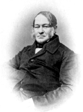 Baltisaksa geoloog ja uurimisreisija Ernst Reinhold Hofmann (1801–1871).